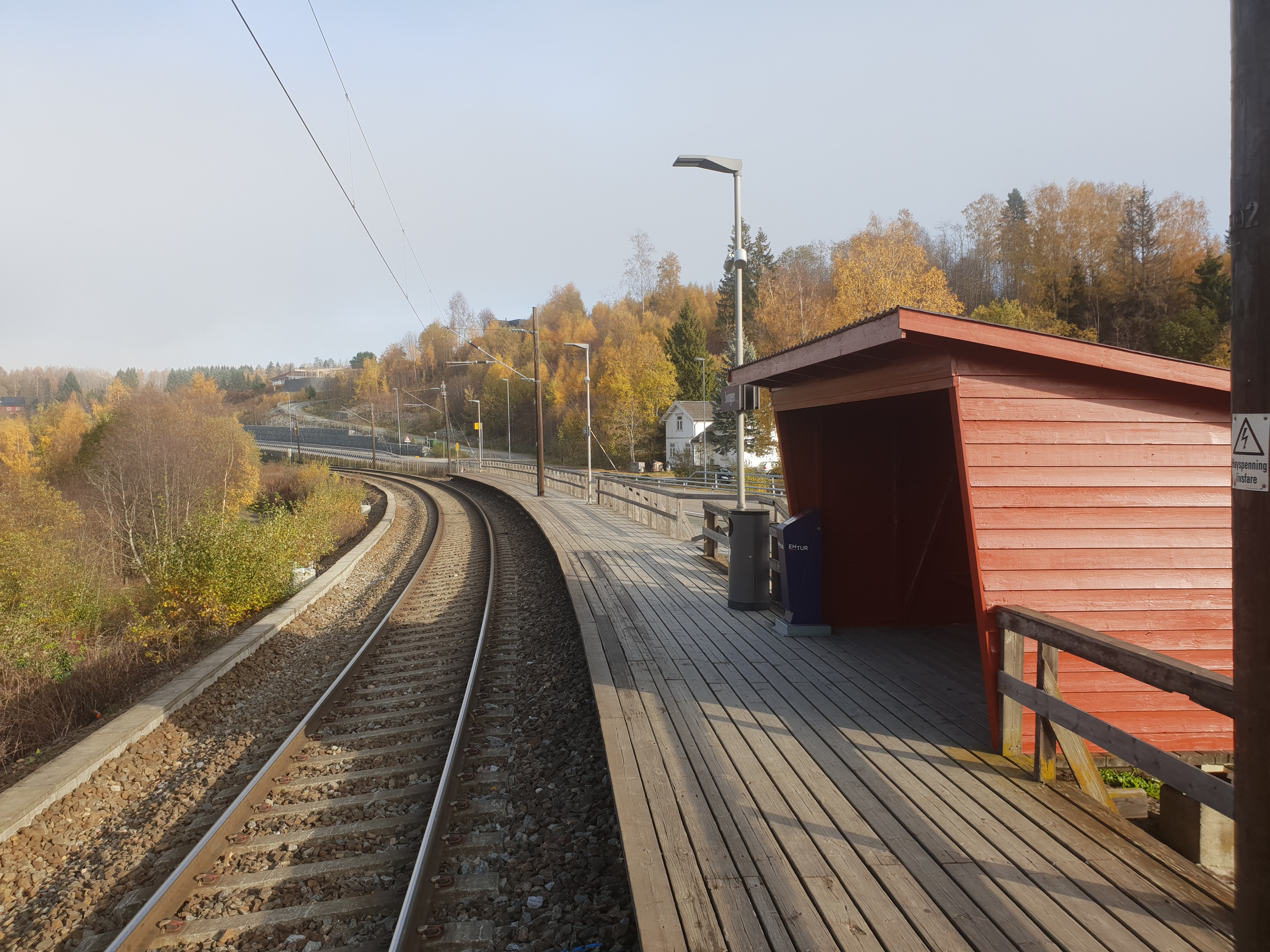 Svingen holdeplass